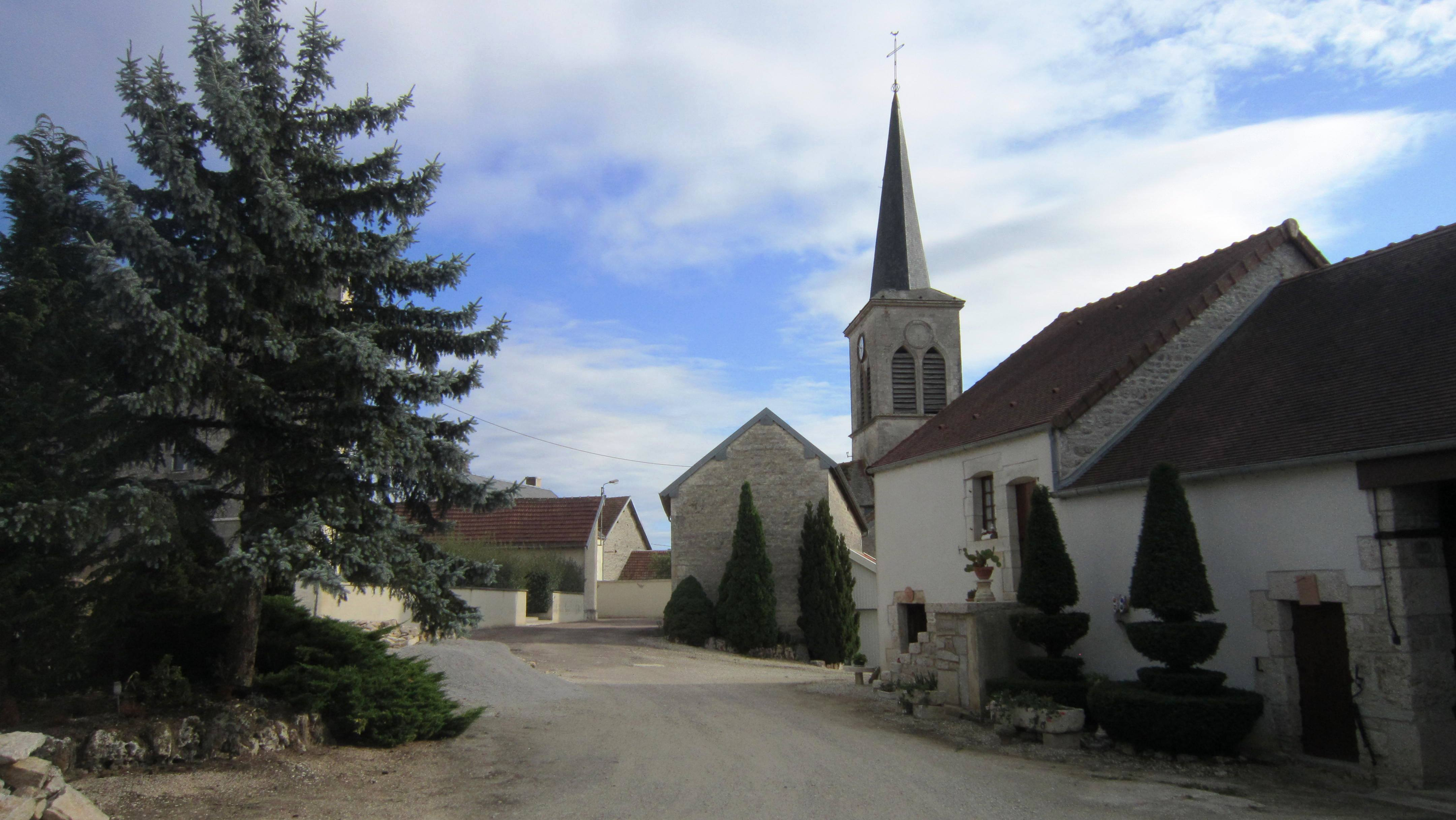 Bissey-la-Pierre (Côte-d'Or